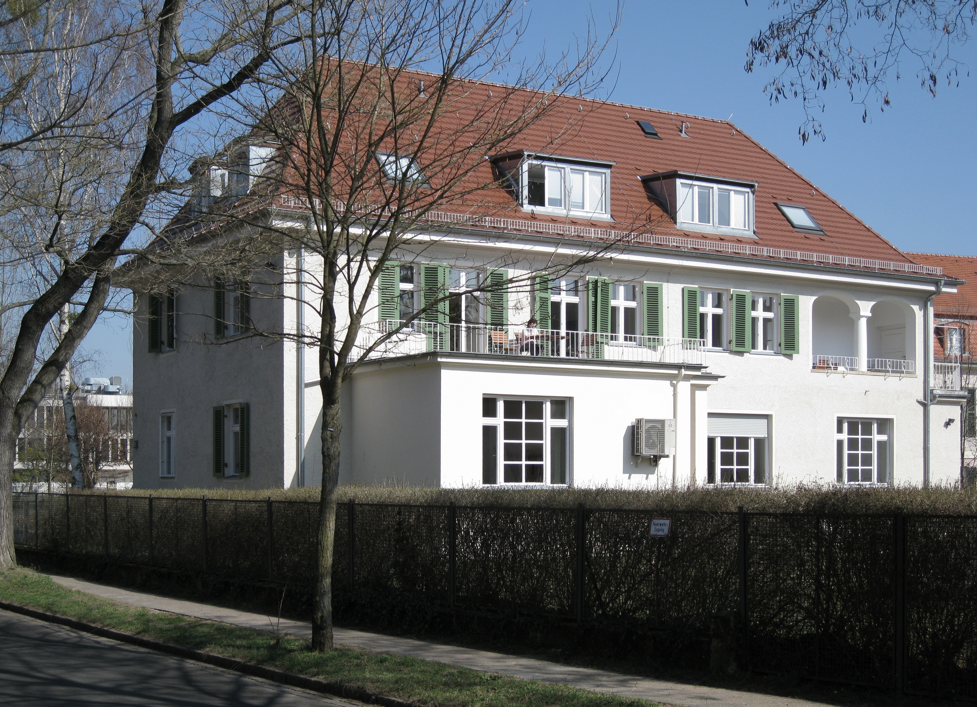 Direktorenwohnhaus